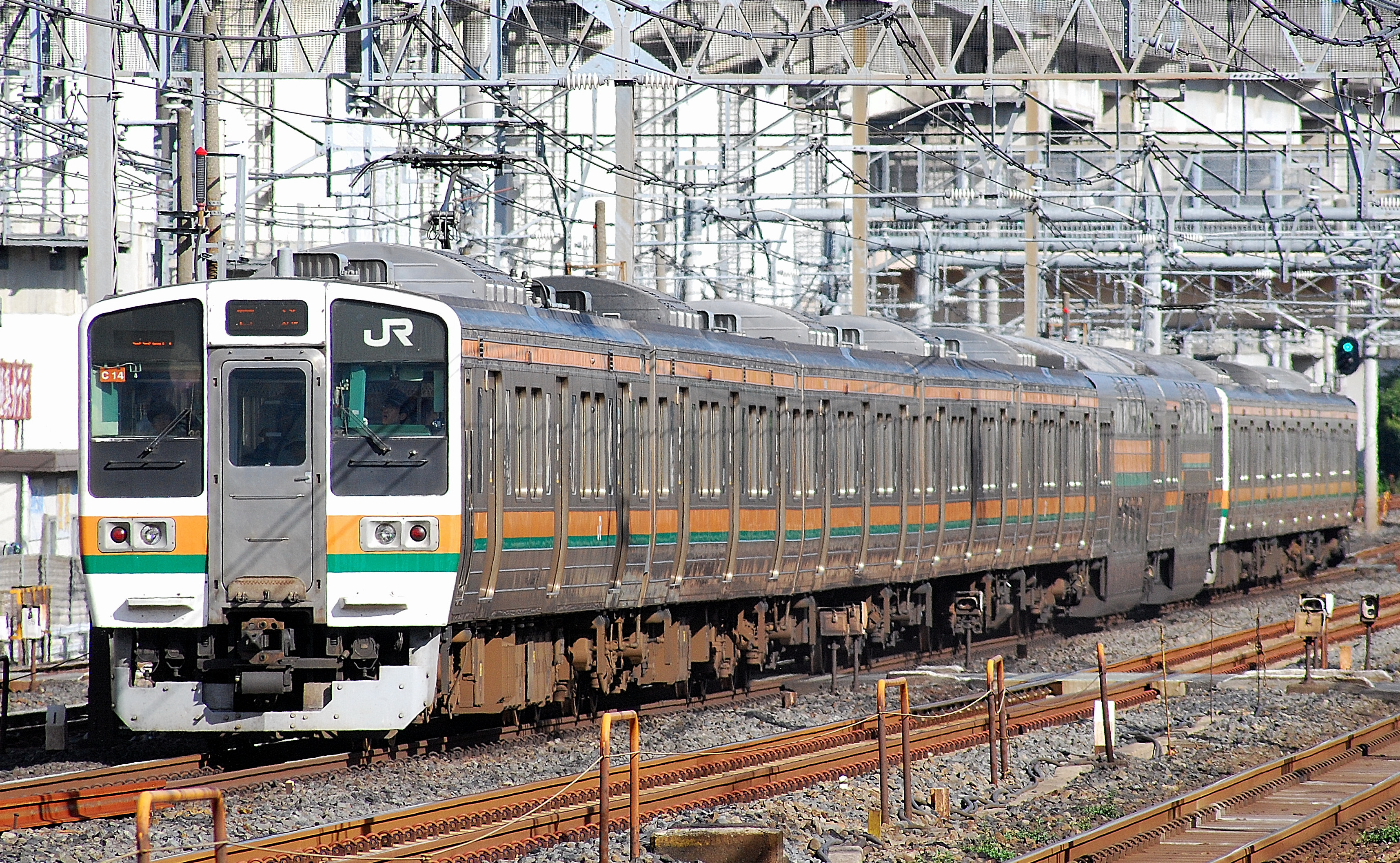 JR東日本高崎車両センター所属の211系3000番台C14編成（公道から撮影）。